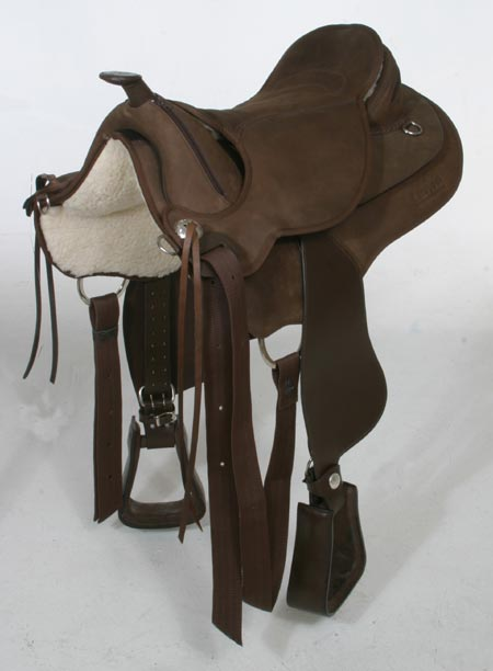 Barefoot saddle Arizona